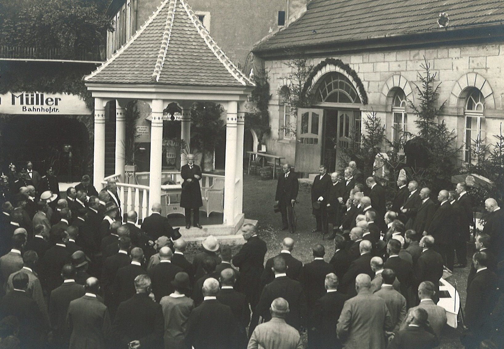 Oberregierungsrat Jakob Degen bei seiner Eröffnungsansprache anlässlich der Gewerbeschau Kronach im August 1924